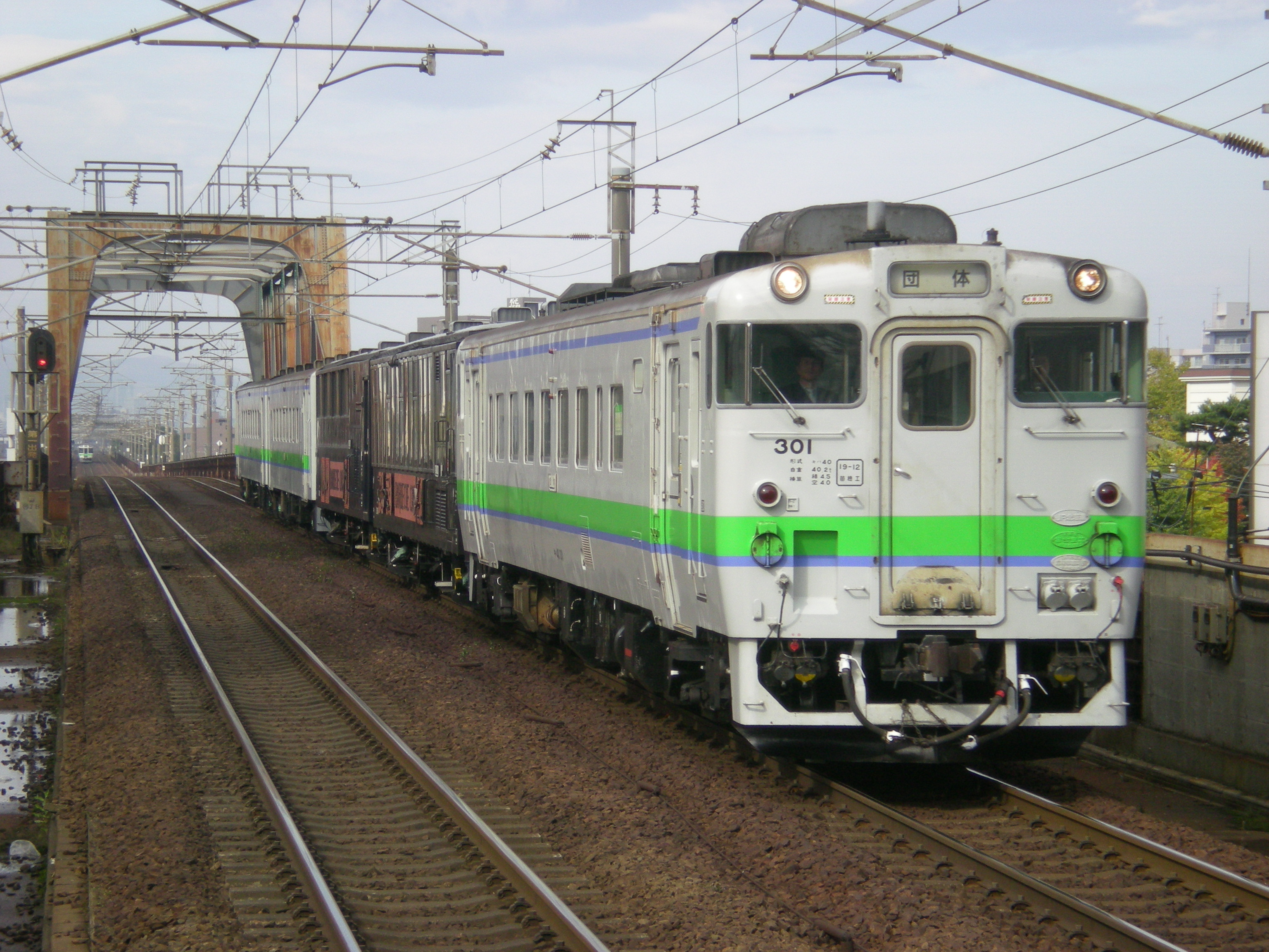 バーベキューカ-を挟んだ団体列車、新札幌駅にて撮影。